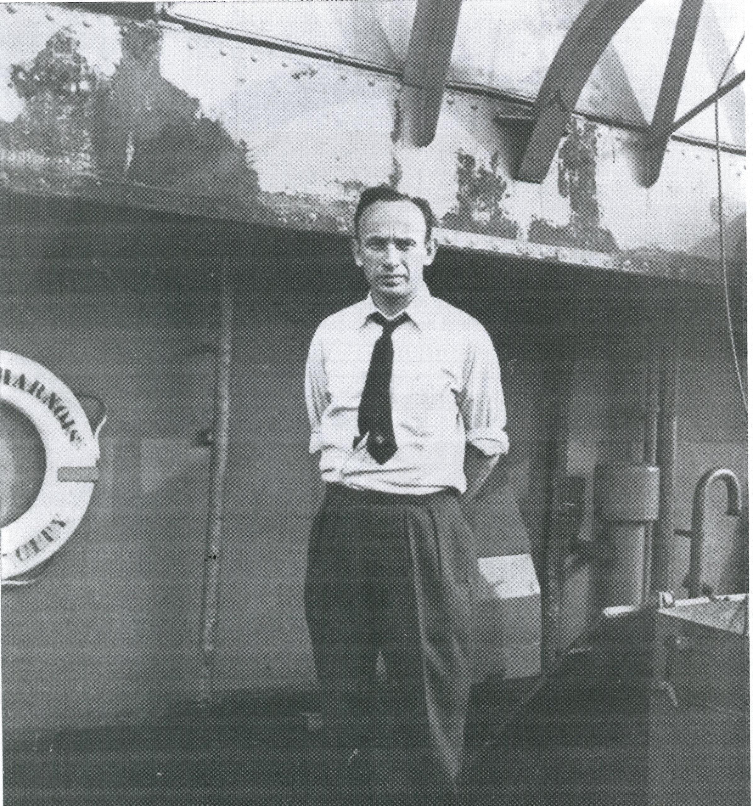 יוסף בוקסנבאום